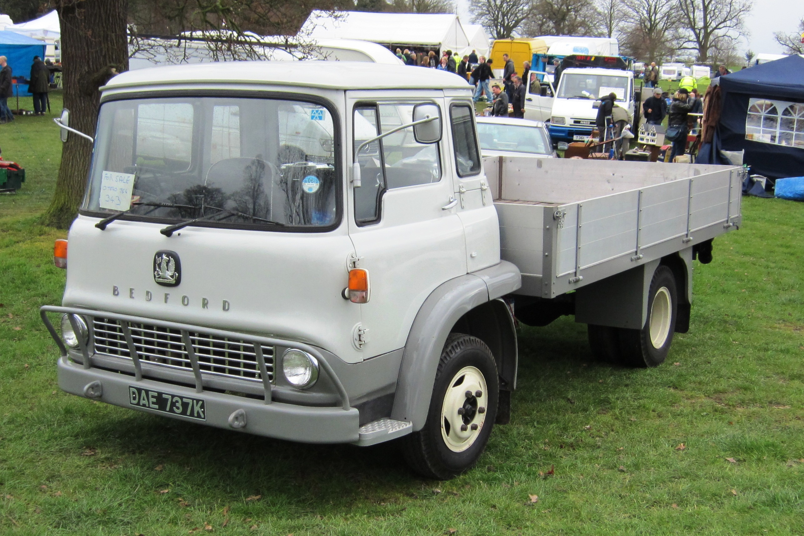 Bedford TK at Weston Park